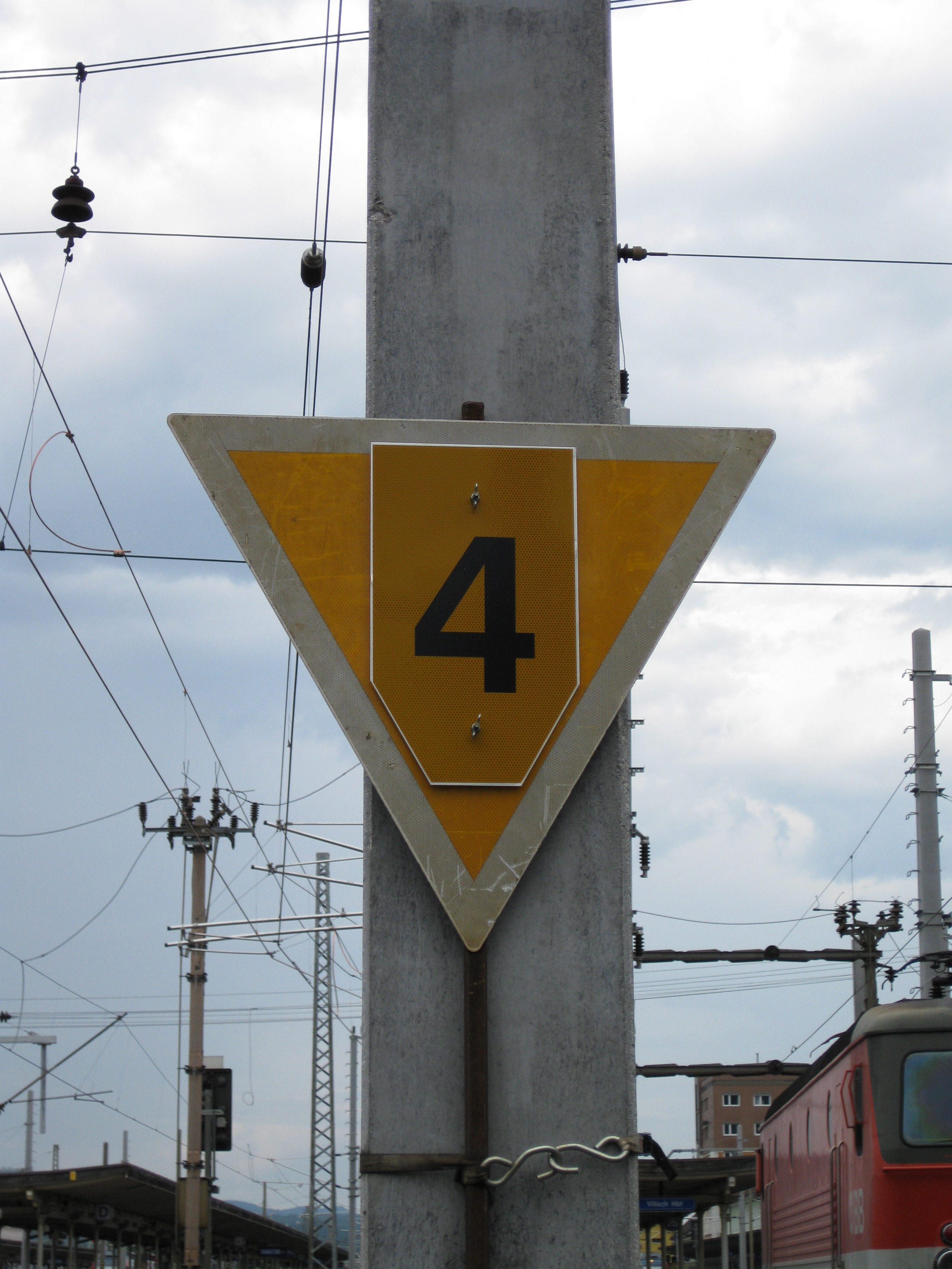 Geschwindigkeitsvoranzeiger ÖBB